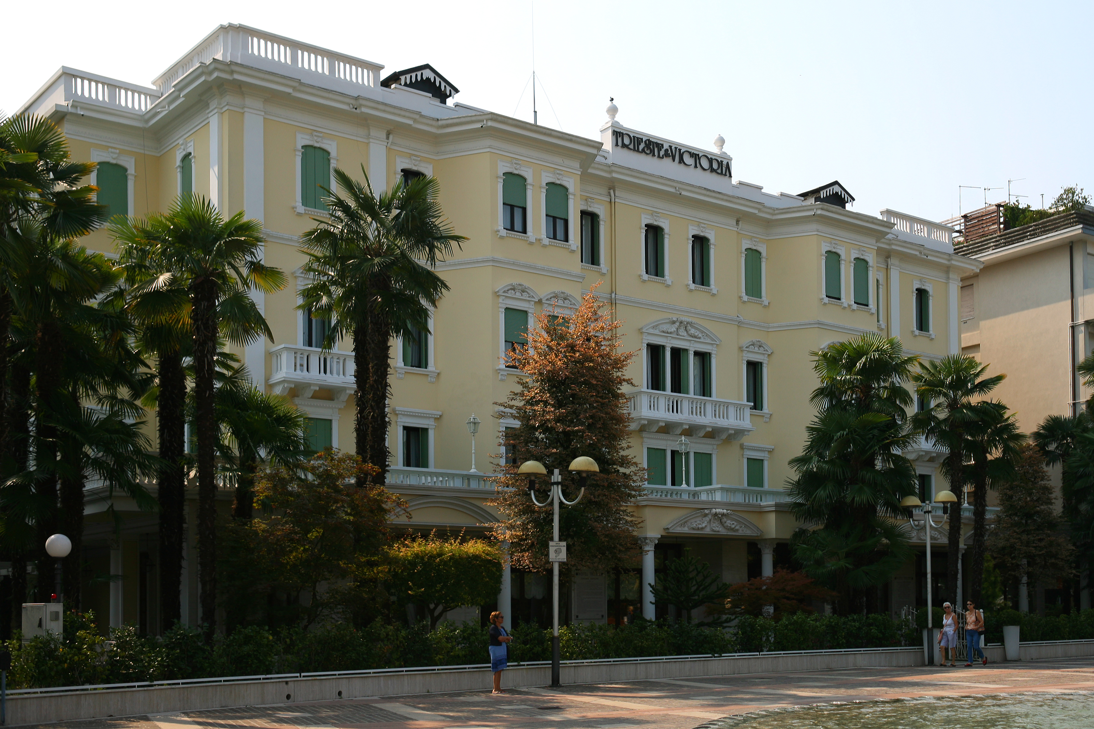 Hotel Trieste & Victoria ad Abano Terme, veduta di tre quarti